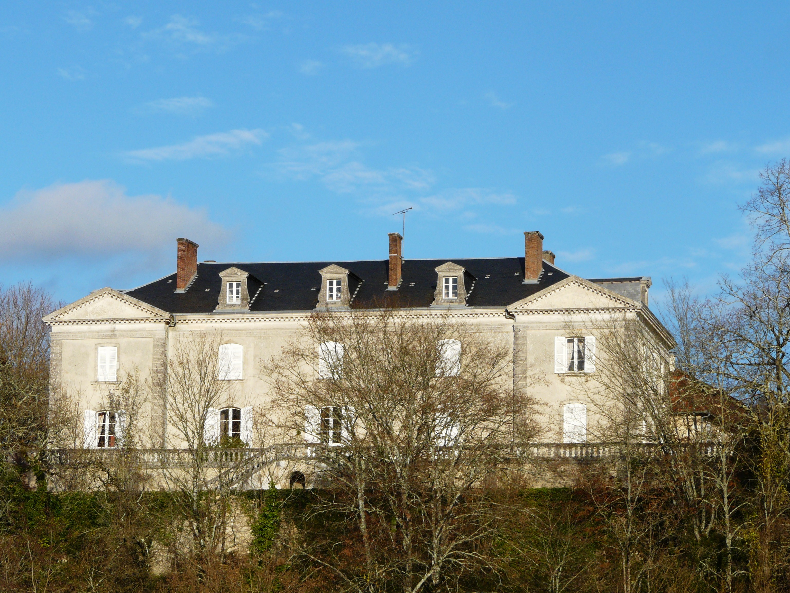 Le château de Brochard vu du sud-ouest, Saint-Front-d'Alemps, Dordogne, France